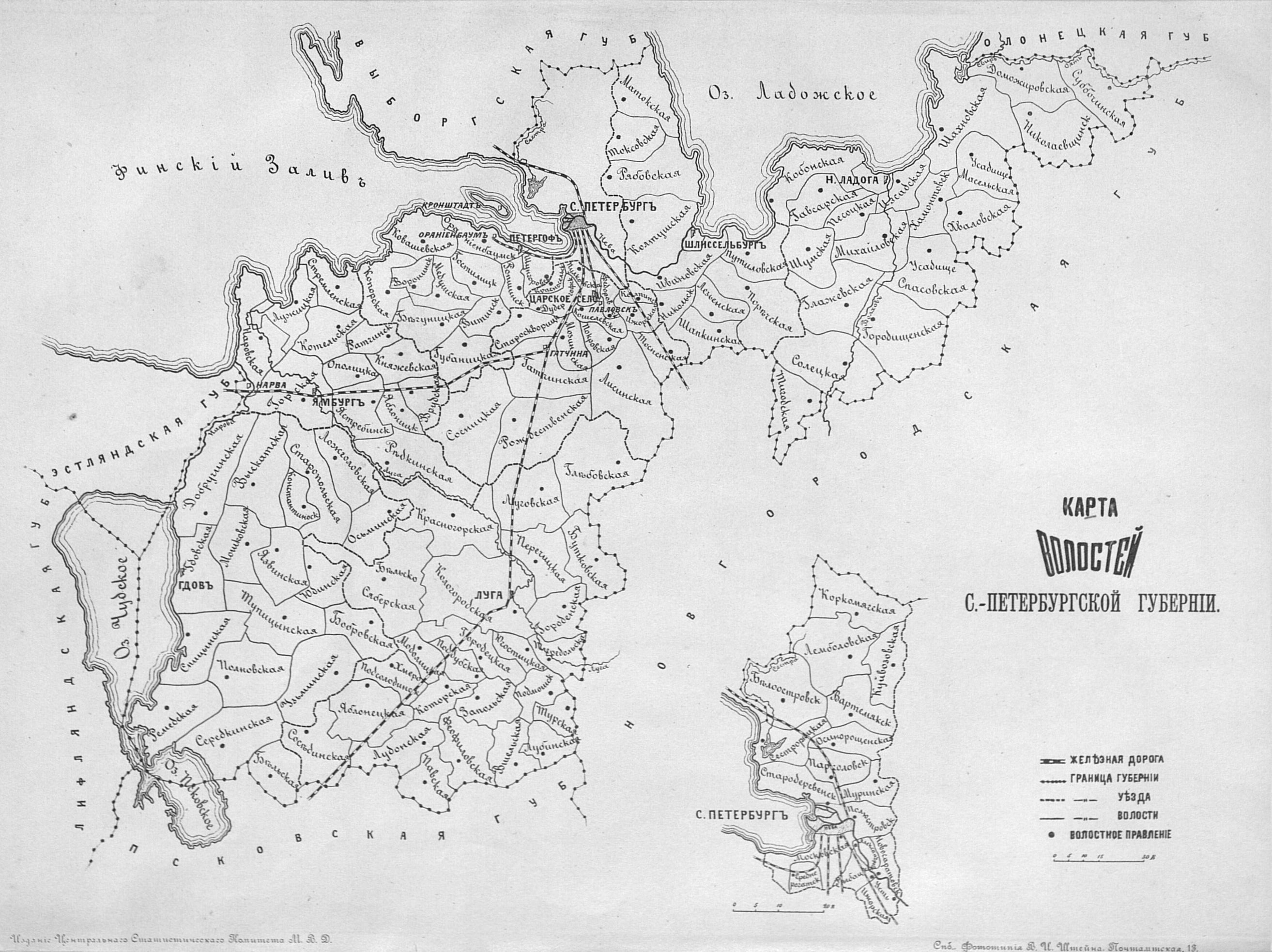 Карта волостей Санкт-Петербургской губернии